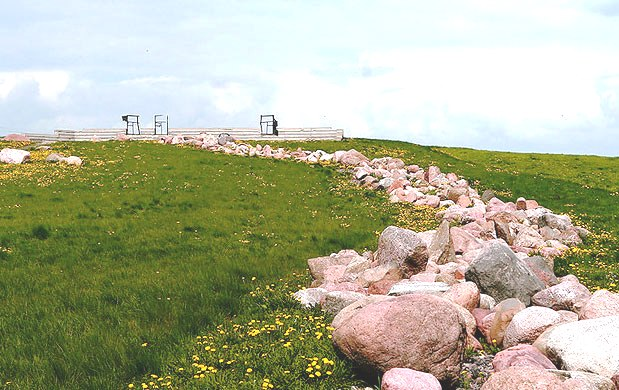 Мемориальный комплекс погибшим евреям из гетто посёлка Городея (Несвижский район). Представляет собой разрушенный угол символического еврейского дома, в котором о жилье напоминают только три окна. К месту убийства ведет узкая тропинка вдоль аллеи рябин, красные ягоды которой похожи на капли крови. Рядом тянется гряда из 1137 камней-валунов, собранных жителями окружающих деревень в память об убитых евреях